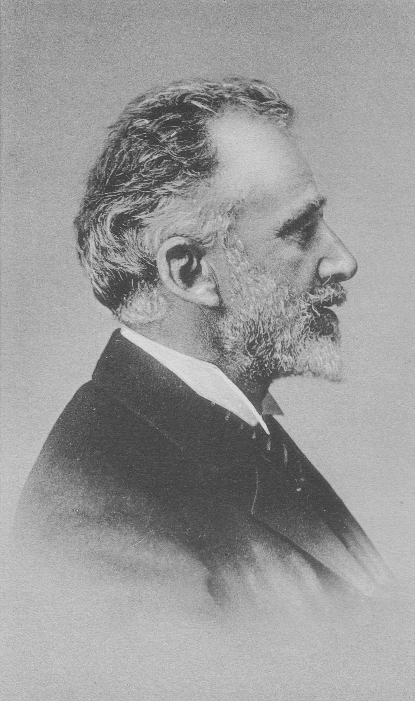 Julius Zeyer 1. července 1897. Fotografie J. Mulače v Praze (původní titulek)